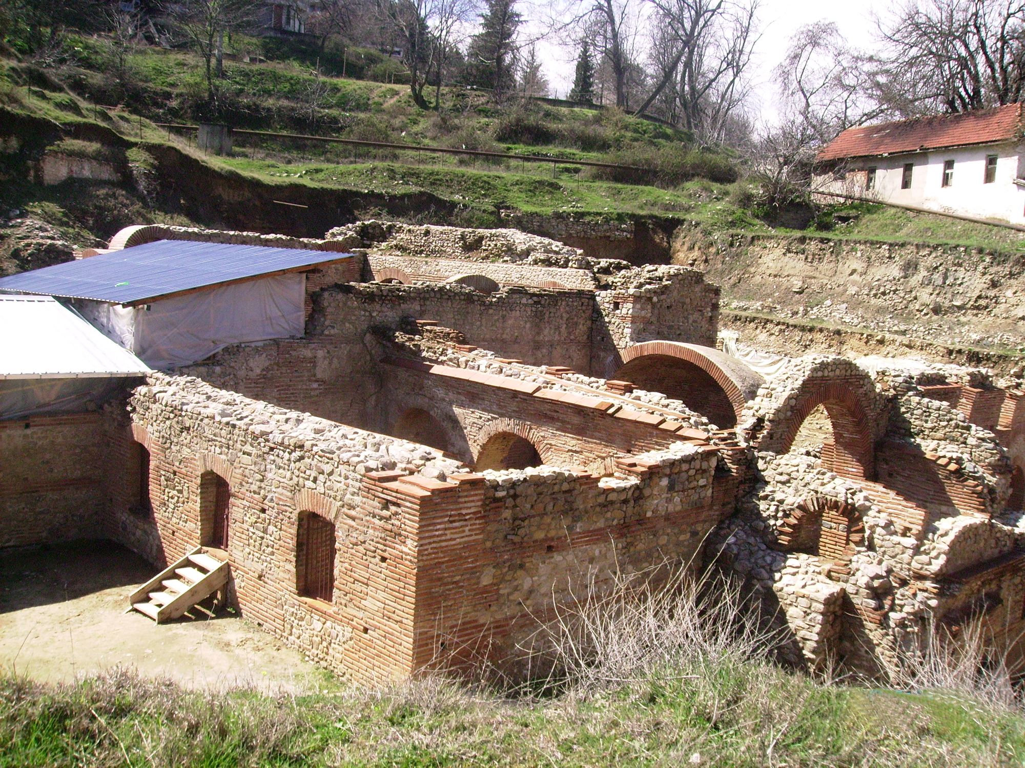 Римски бани край Банско, Република Македония.